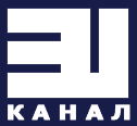 Логотип 31 телеканала с 2004 года по 30 марта 2008 года.